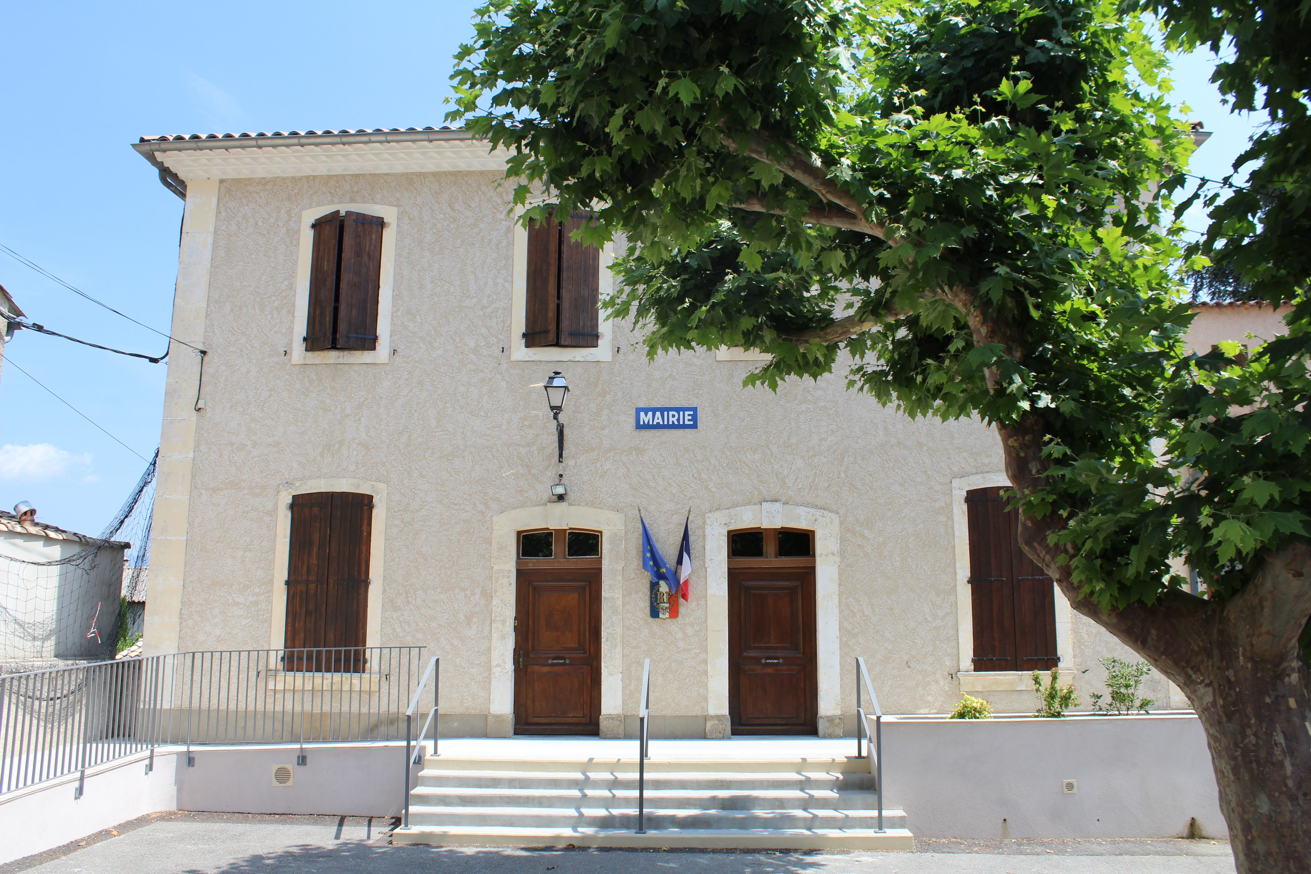 Mairie de Pierrerue, Alpes-de-Haute-Provence.